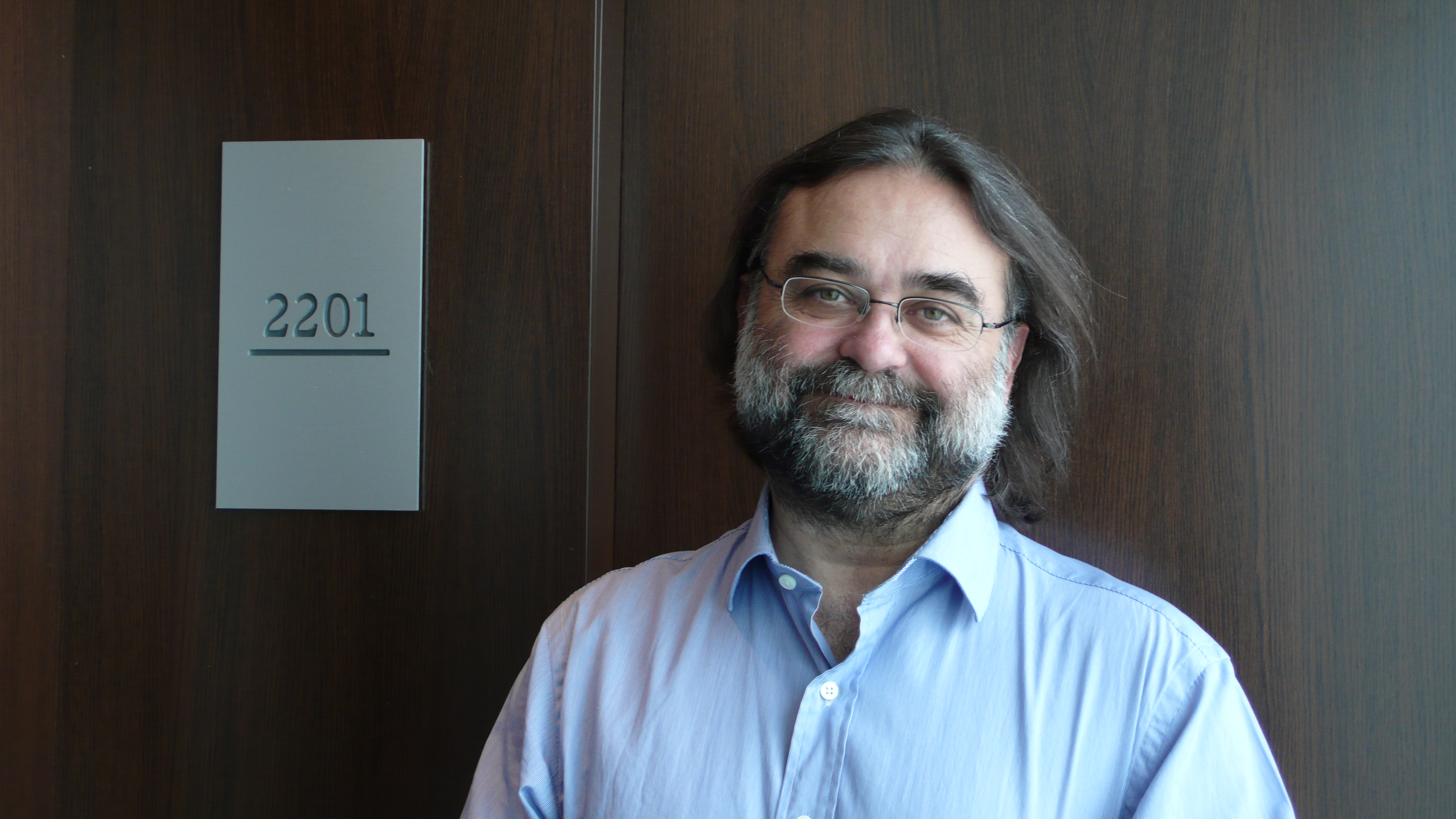 Imagen de Fernando Gallardo